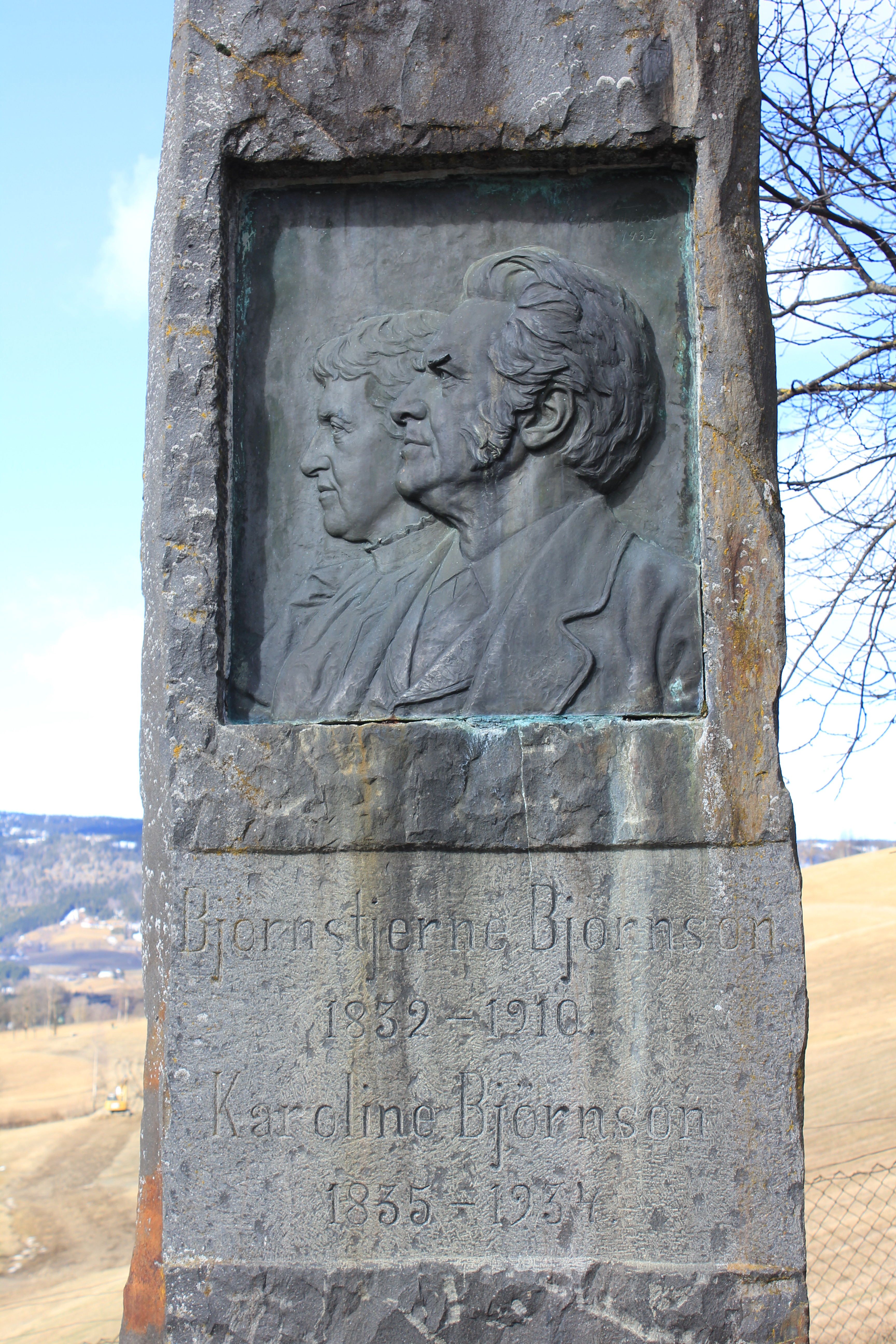 Bautastein i tunet på Aulestad gård i Gausdal, med innfelt relieff av Bjørnstjerne Bjørnson og hans kone Karoline Bjørnson. Relieffet er laget av billedhuggeren Trygve Thorsen. Bautaen ble avduket 1932.